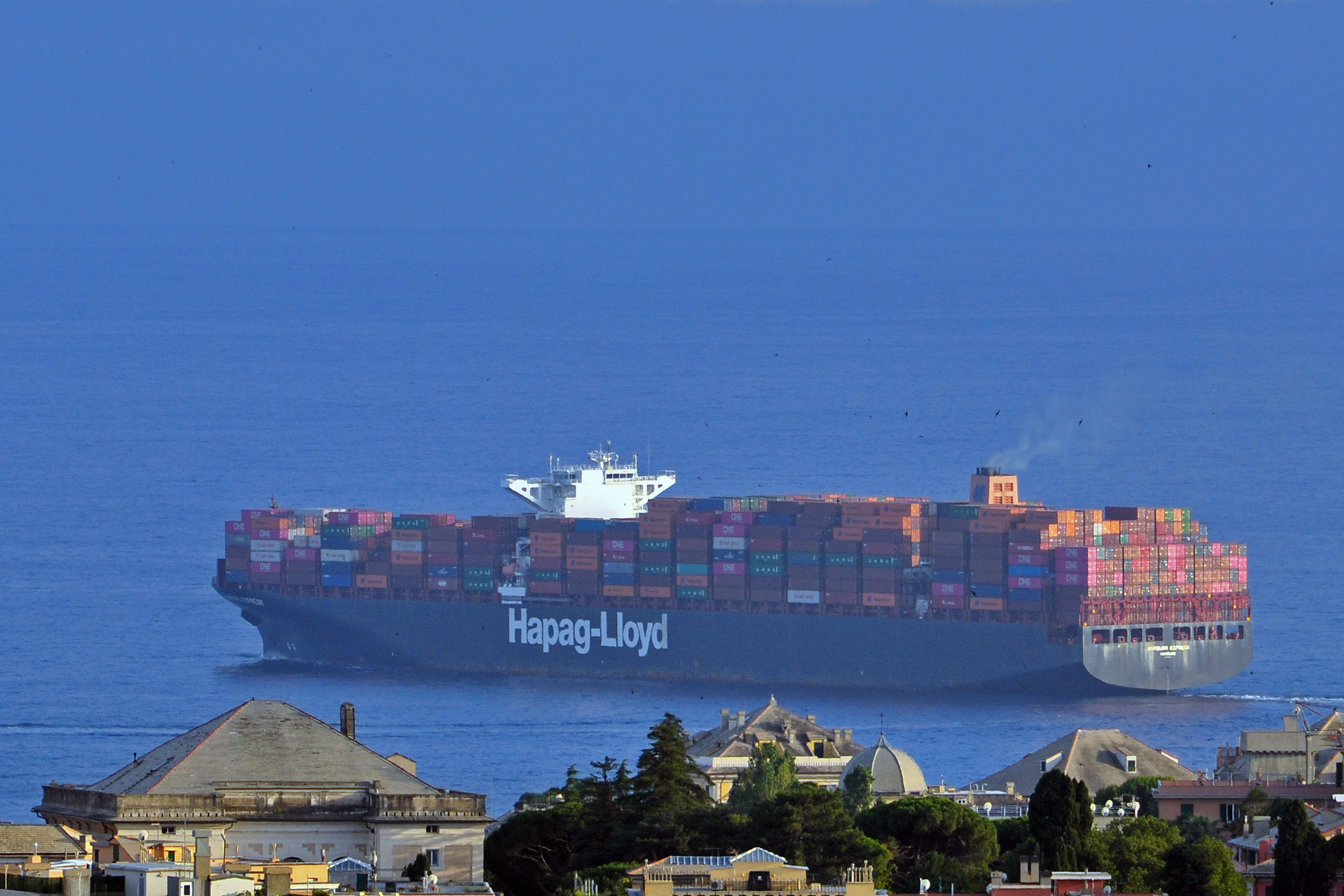 Nave Cargo della Hapag-Lloyd in partenza dal porto di Genova.